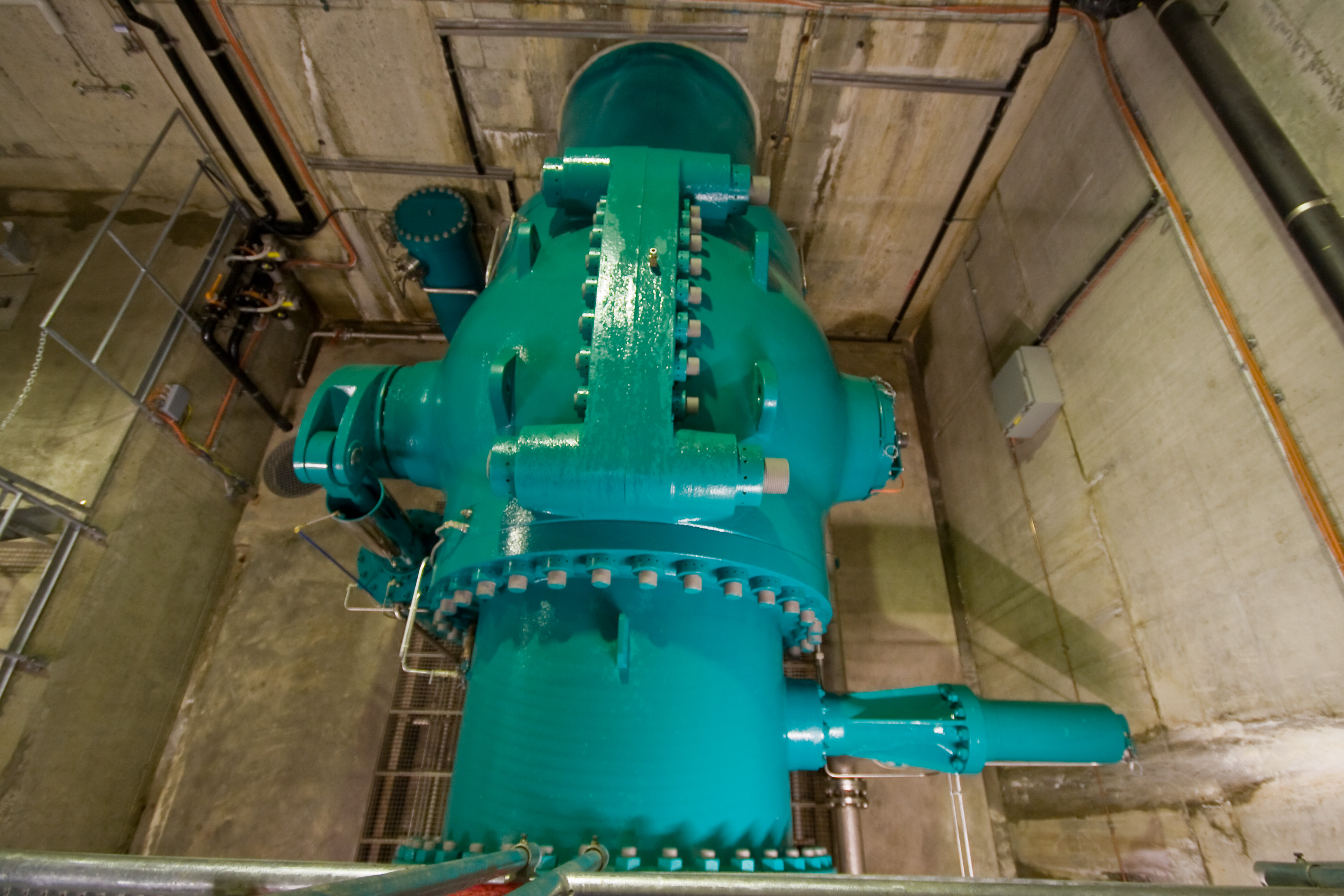 Kugelschieber im Wasserkraftwerk Amsteg / Ball valve at Amsteg power plant